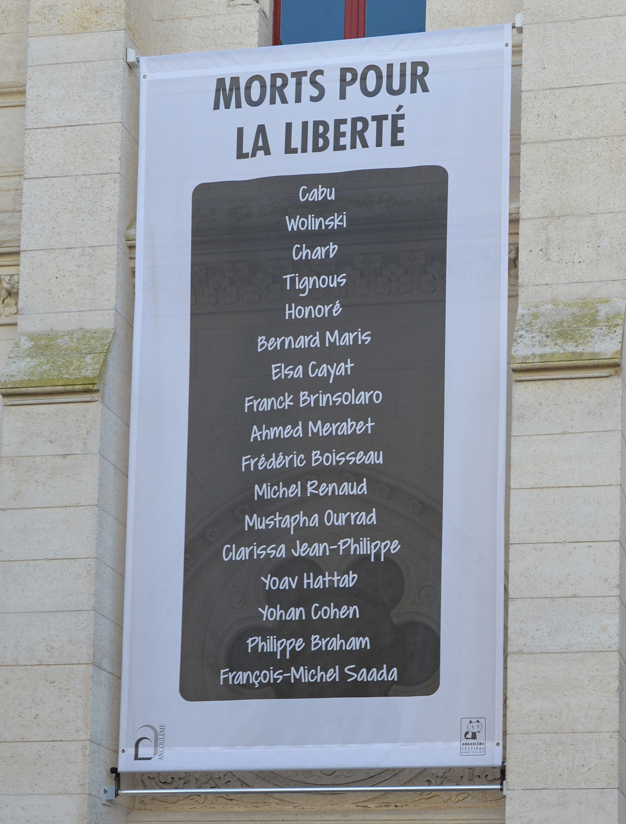 Fabien Vehlmann à la Marche des auteurs de bande dessinée le 31 janvier 2015 lors du Festival d'Angoulême.